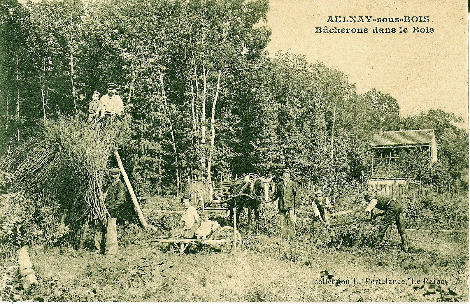 Carte postale ancienne éditée par Portelance au RaincyAULNAY-SOUS-BOIS - Bucherons dans le Bois (Forêt de Bondy)